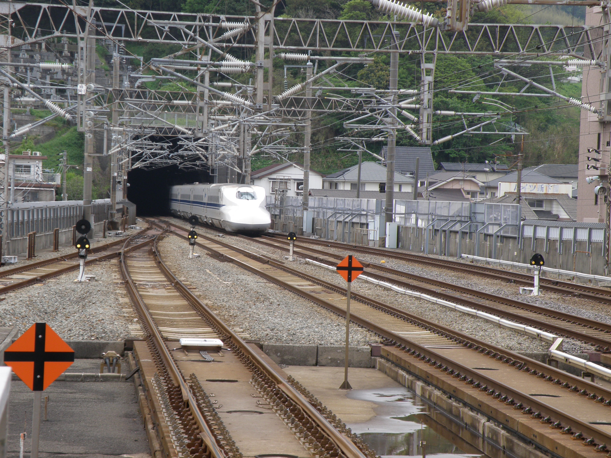 新関門トンネル入口（新下関駅より）